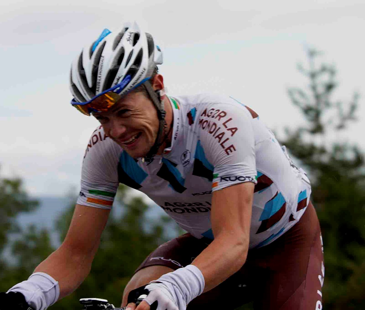 col de manse 090 nicolas roche